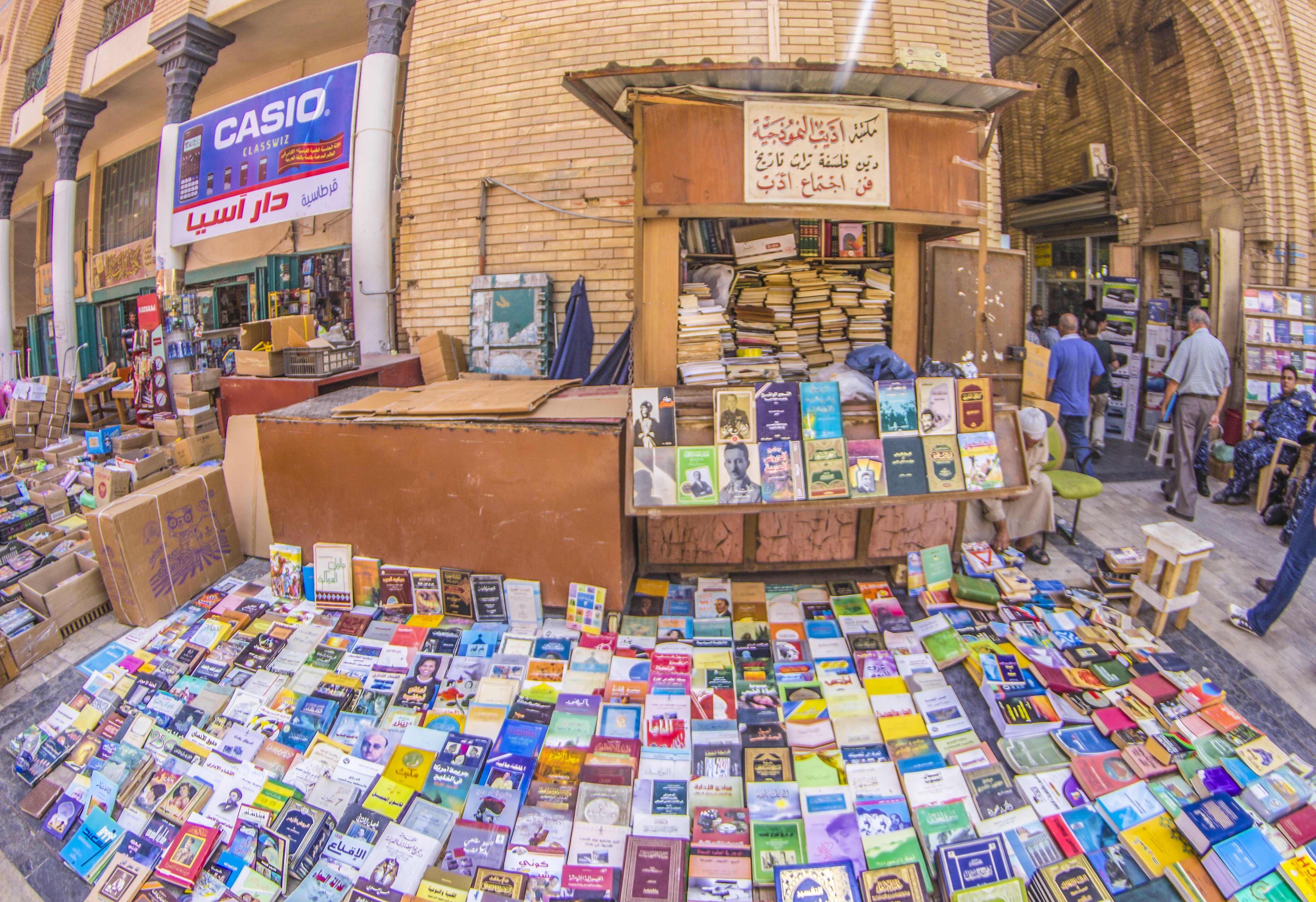 مشهد للكتب المعروضة في شارع المتنبي ببغداد 2015